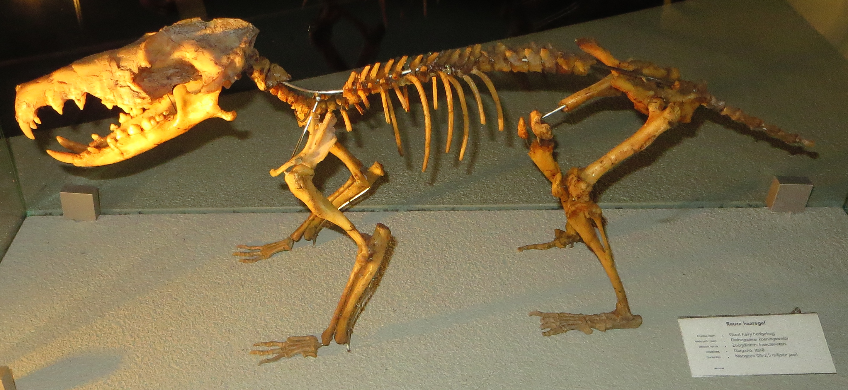 Fossil of Deinogalerix, an extinct mammal - Took the picture at Naturalis, Leiden